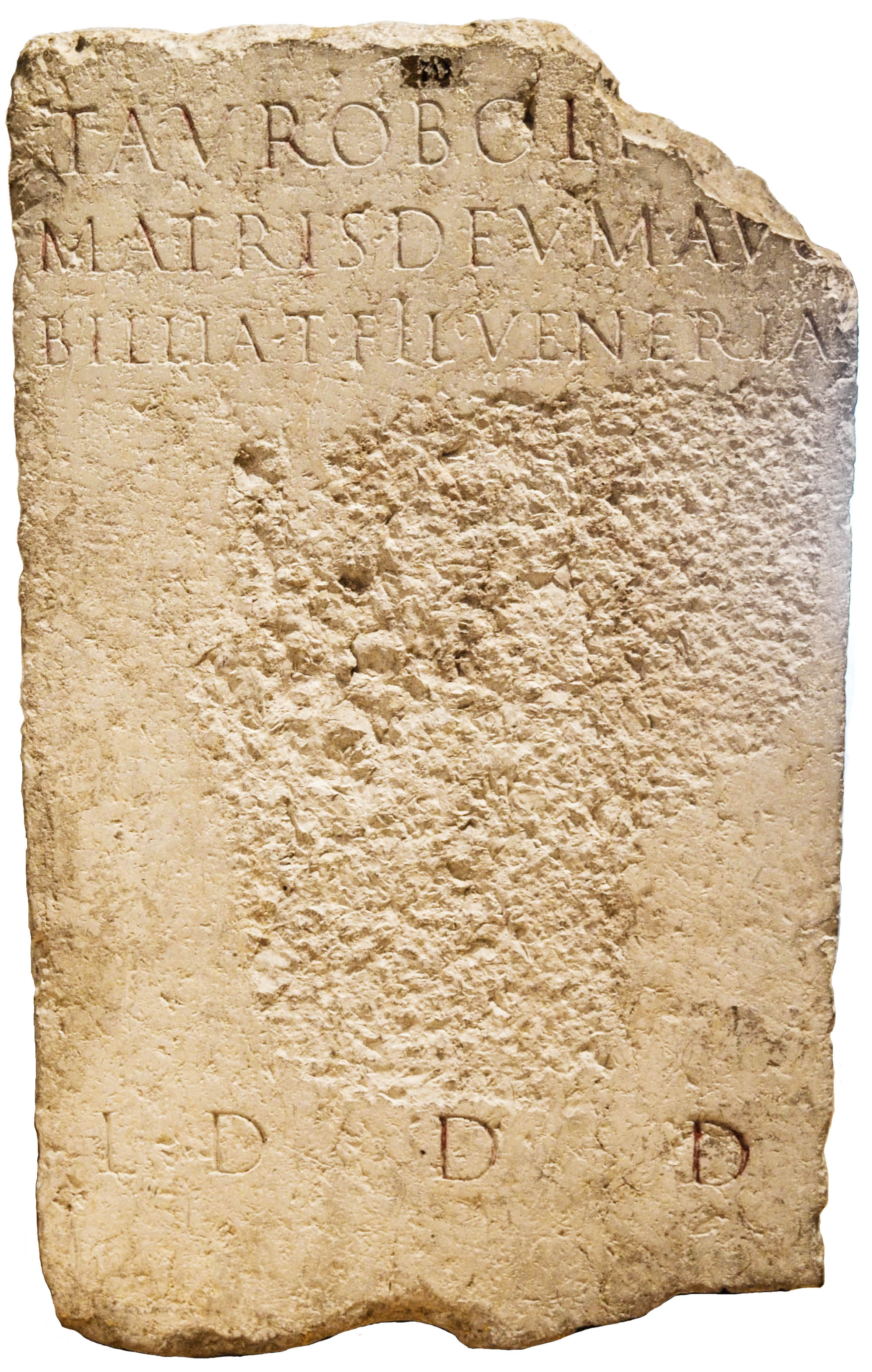 Autel taurobolique, musée gallo-romain de Fourvière, Lyon (CIL XIII 1756)